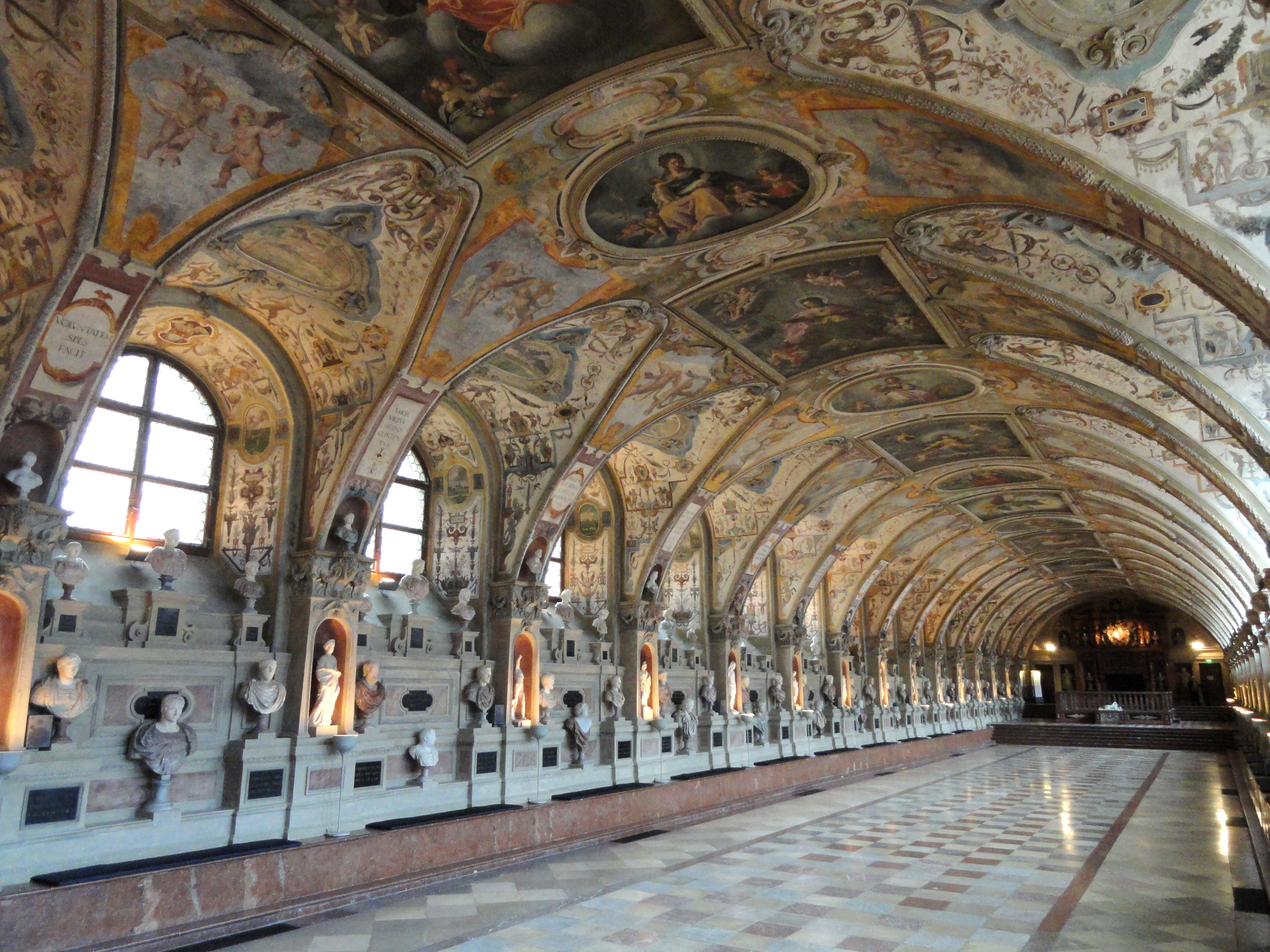 Antiquarium in the Münchner Residenz, Munich, Germany.